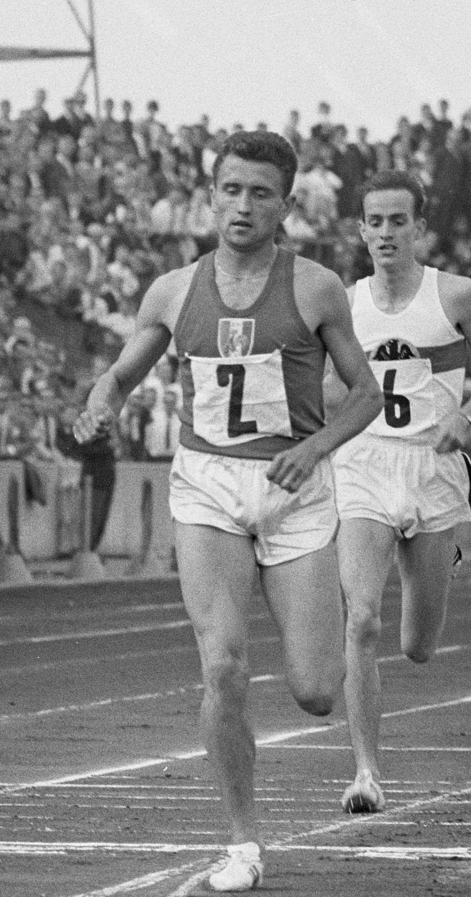 Zes Landen Atletiek in Enschede. Finish 1500m in volgorde de nummers 1, 2 en 3 M. Jazy , H. Norpoth (Duitsland) en H. Snepvangers